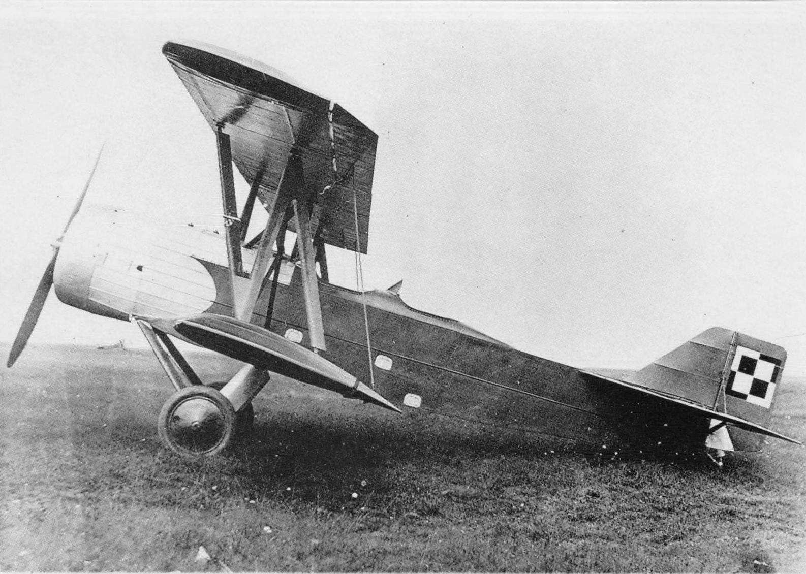 Bartel BM-4, aereo da addestramento biposto, monomotore biplano, progettista Ryszard Bartel, produttori Wielkopolska Wytwórnia Samolotów Samolot e Podlaska Wytwórnia Samolotów (PWS). Data e luogo della foto sconosciuti ma presumibilmente scattata in Polonia.